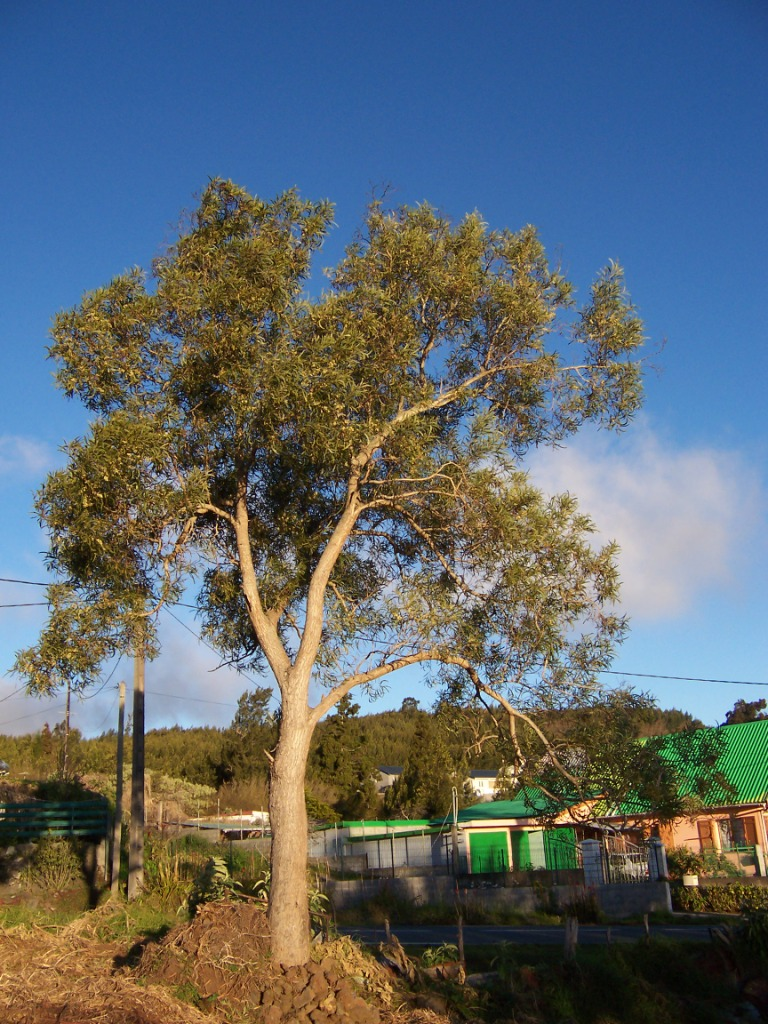 fr: Tamarin des hauts (Acacia heterophylla) - Jeune arbre dans un jardin de la Plaine des Cafres (Ile de la Réunion) en: Réunion mountain tamarin (Acacia heterophylla) - Young tree in a garden of la Plaine des Cafres (Réunion island) Photo: B.navez - 01 SEP 2005 - Réunion island